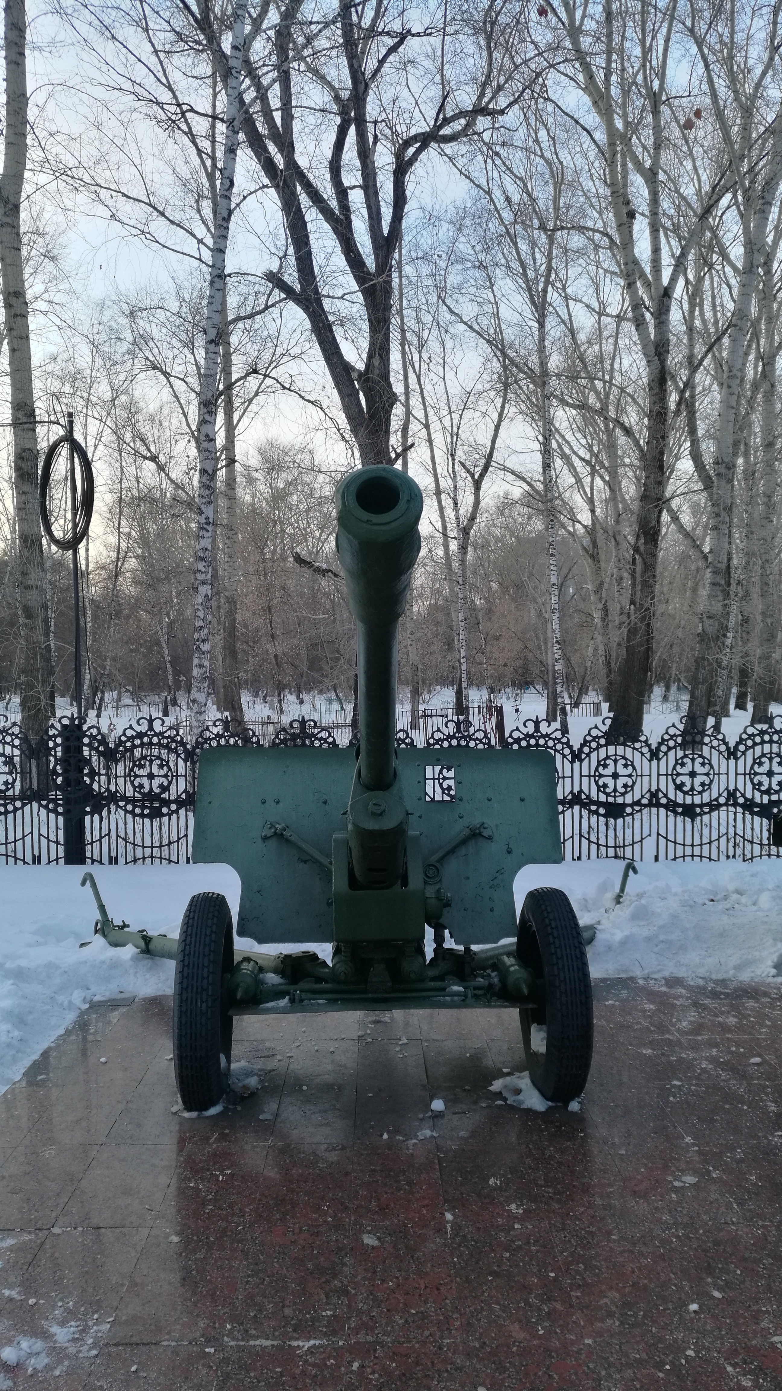 Kanono sur Placo de Memoro. Tjumeno, Rusio.